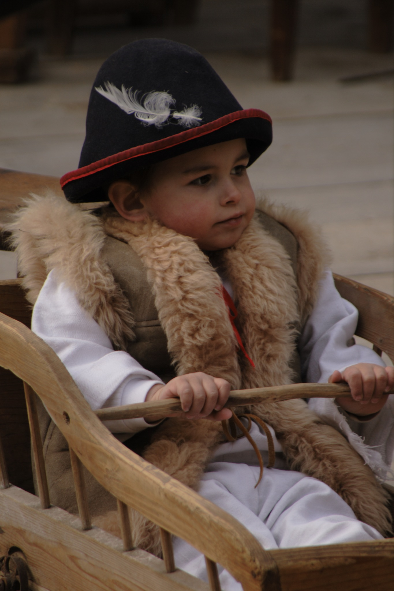 Easter in Slovakia